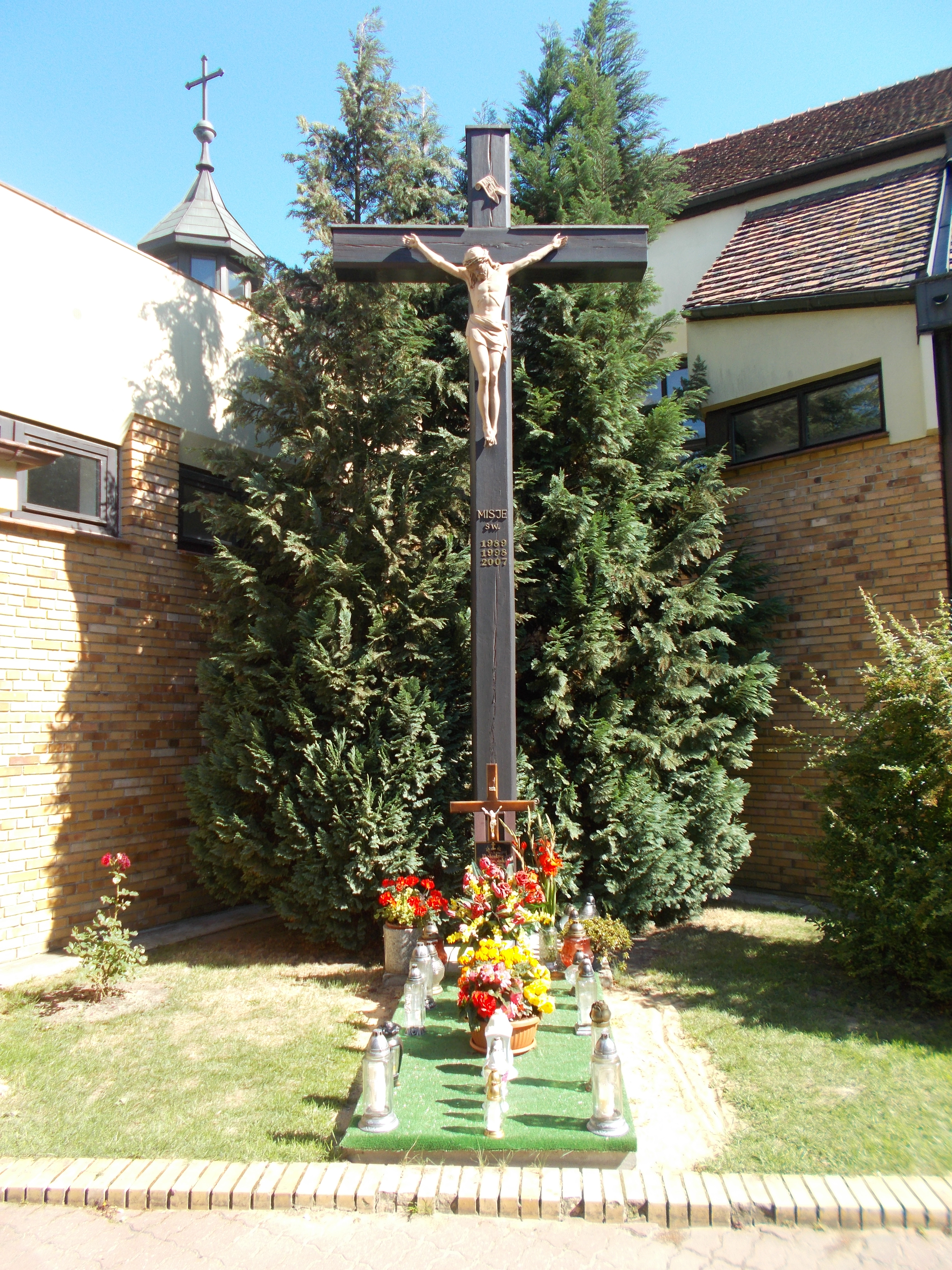 Krzyż misyjny przy kościele pw. św. Józefa w Poznaniu.